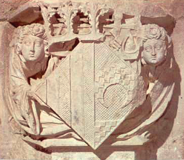 Armes de Maria de Luna (1357-1406) al monestir de Poblet